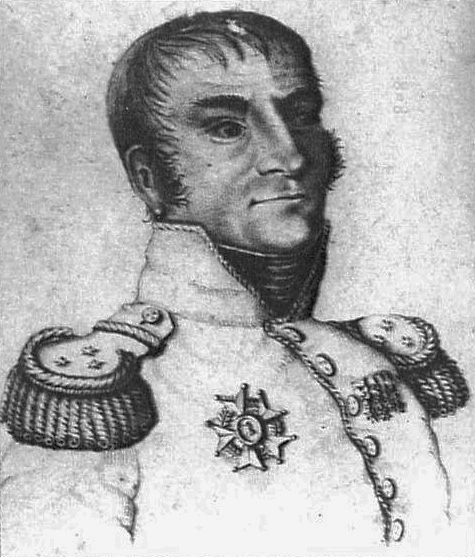 Pierre-Louis Binet, baron de Marcognet (1765-1854), général d'Empire.